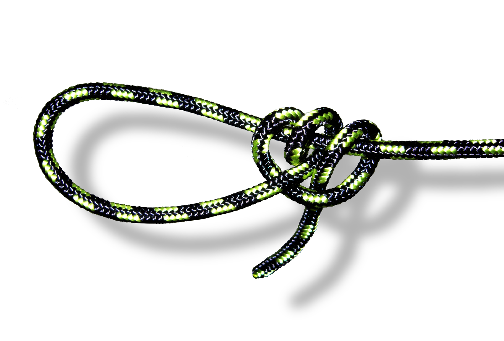 Der Topsegelschotstek, eine nur lastfrei bewegliche Schlinge. Verwendbar zum Beispiel als Zeltleinenspanner.